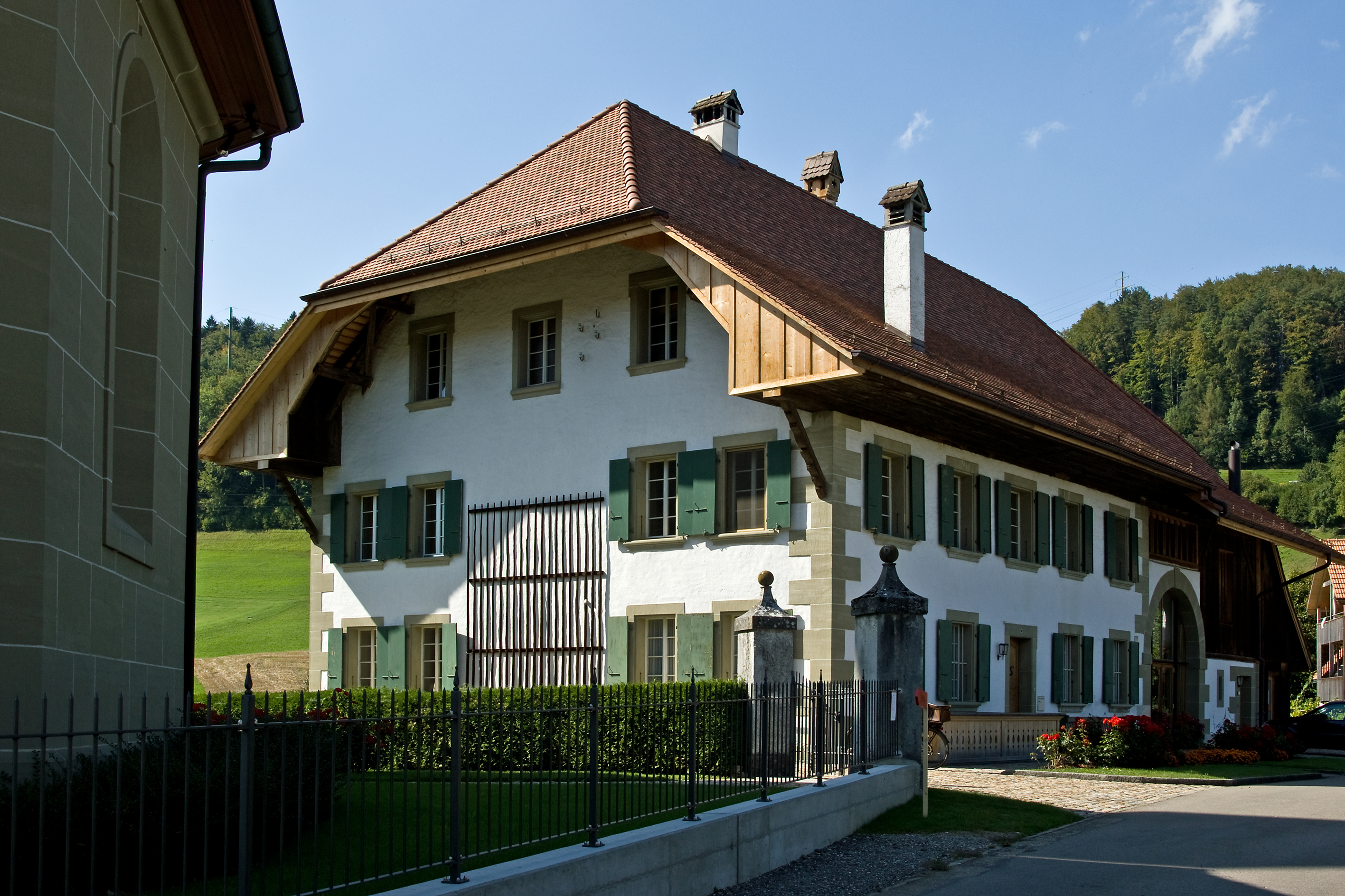 Heimiswil, Pfarrhaus und Kirchgemeindehaus in der Pfrundscheune